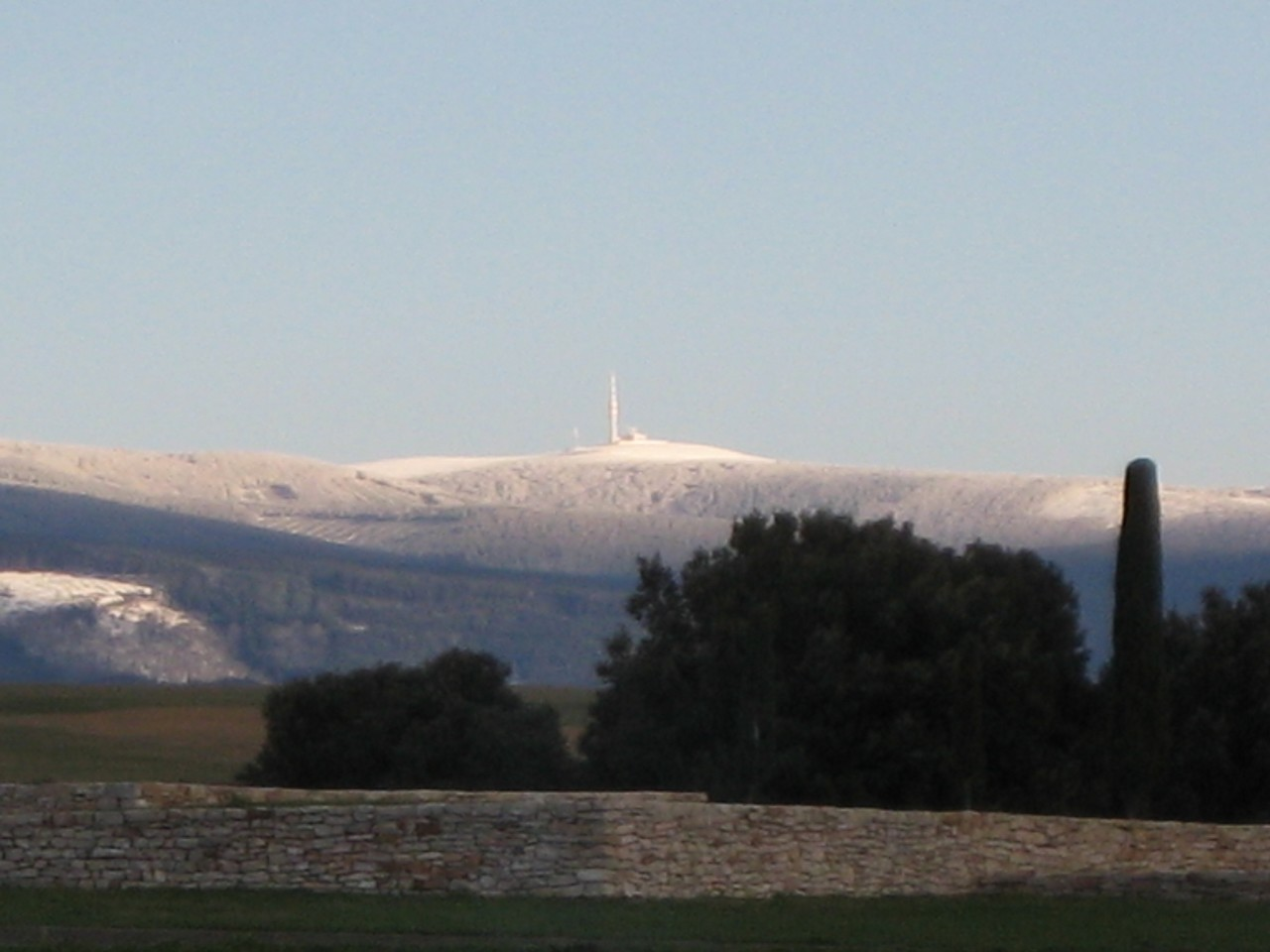 Pic de Nore, situé dans la Montagne Noire, à la frontière des départements de l'Aude et du Tarn